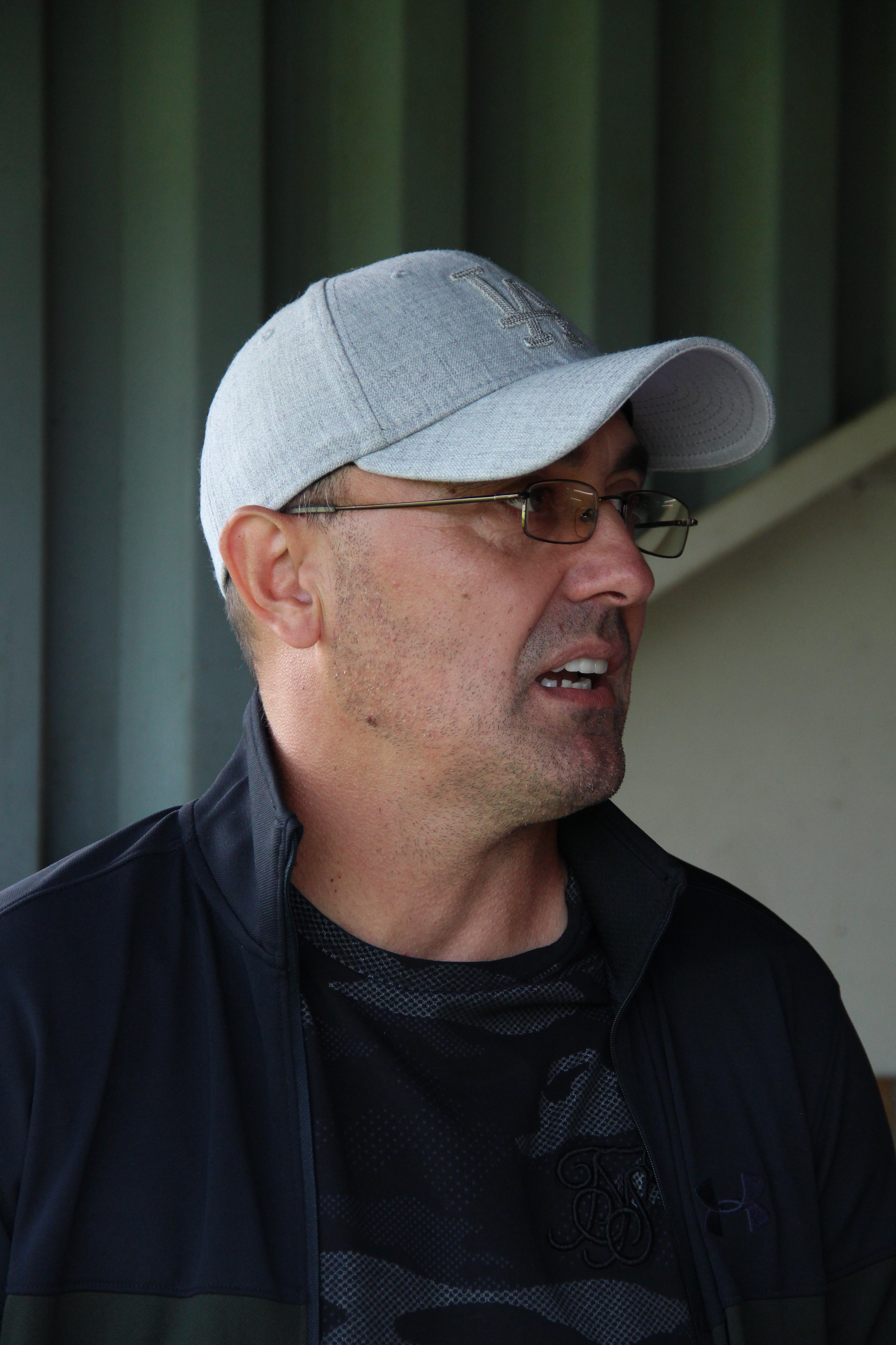 Zeltweger Legendenturnier 2018